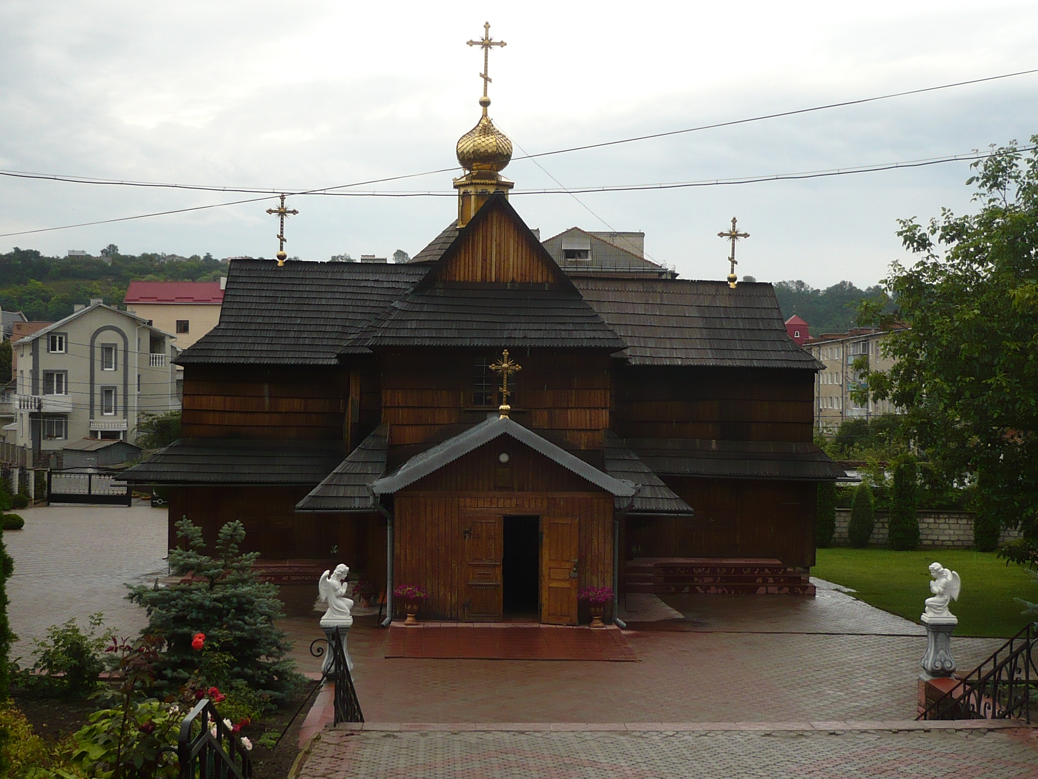 Czortków. Cerkiew